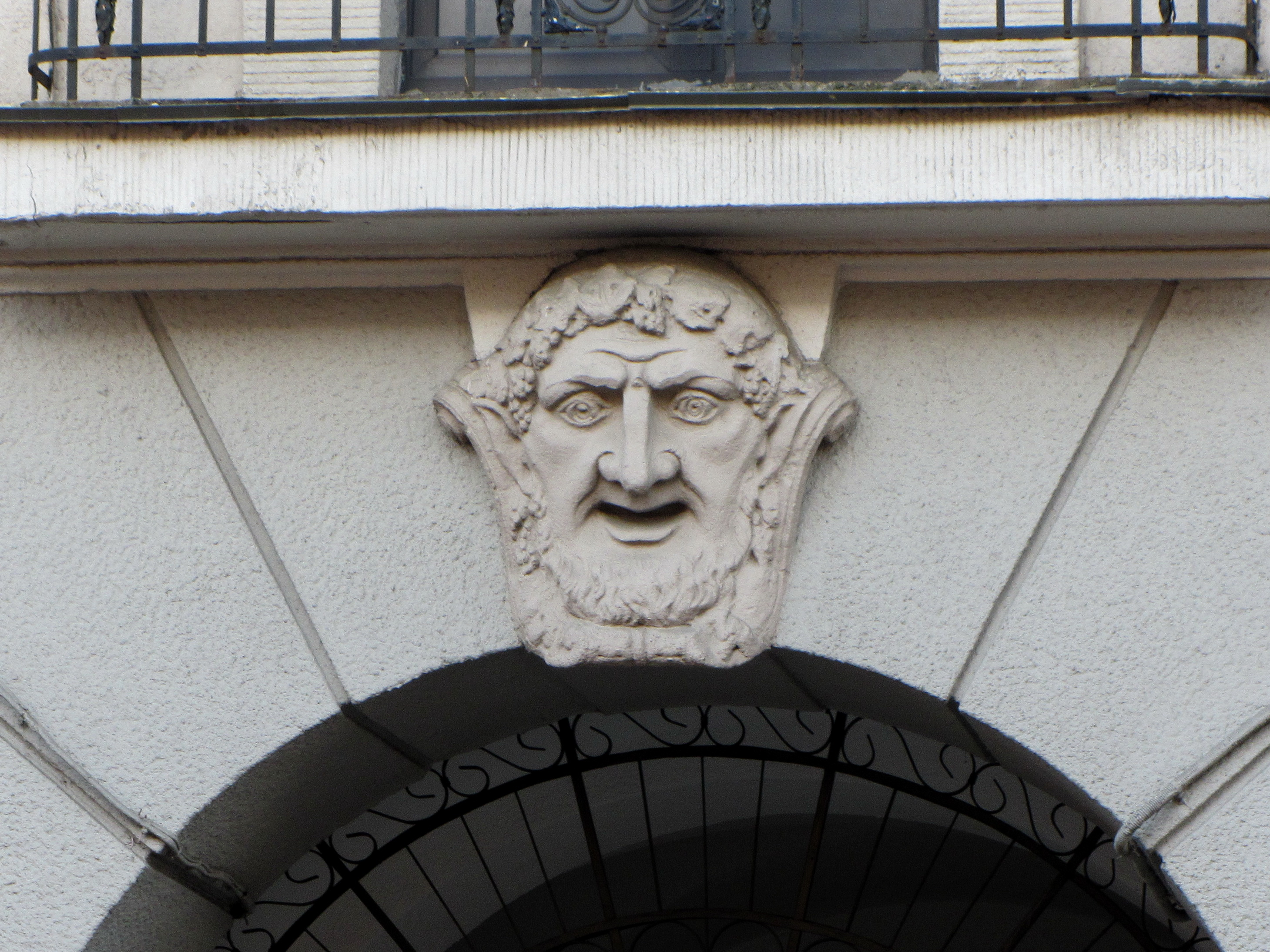 Беларуская (тарашкевіца): Маскарон на доме Сьвянціцкага, Менск.